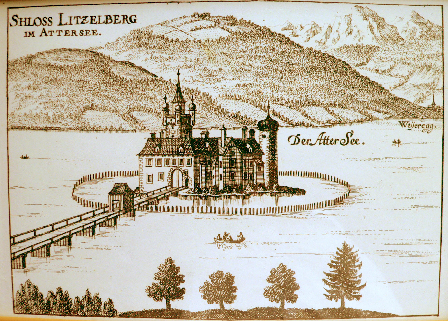 Schloss Litzlberg auf der Insel Litzlberg-Attersee, copper engraving